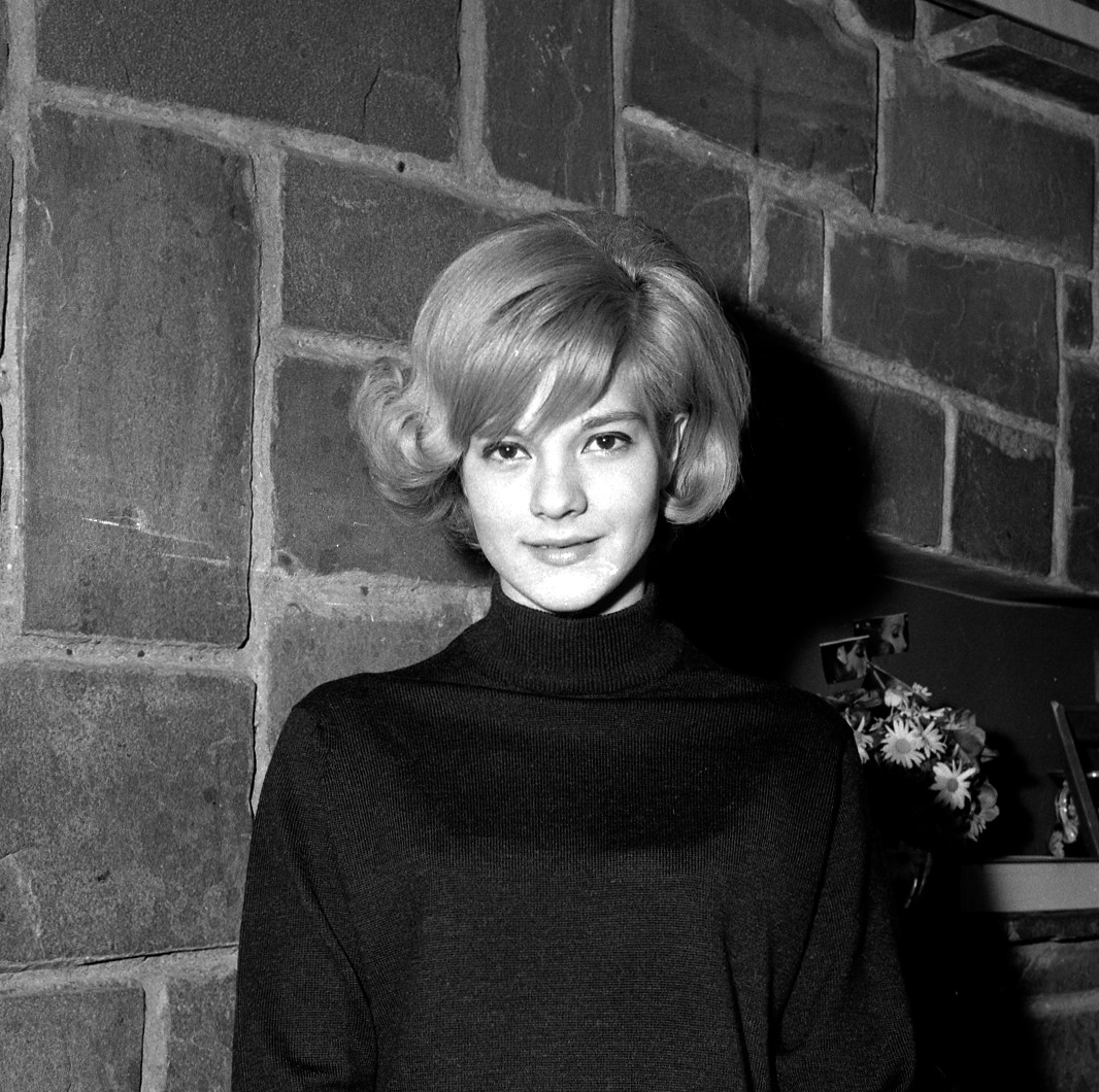 Salon de coiffure, José Queralto, Place Wilson. Le 13 Décembre 1962. Vue de Sylvie Vartan qui pose dans le salon de coiffure.